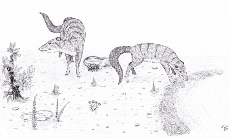 Zwei Indohyus am Ufer (Bleistiftzeichnung)